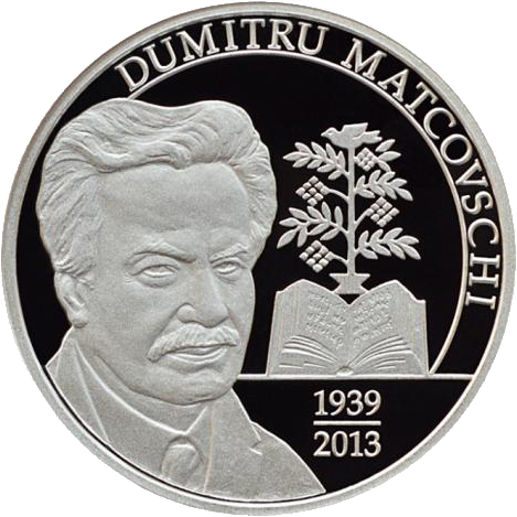 Реверс памятной монеты "75 лет со дня рождения Дмитрия Матковского"